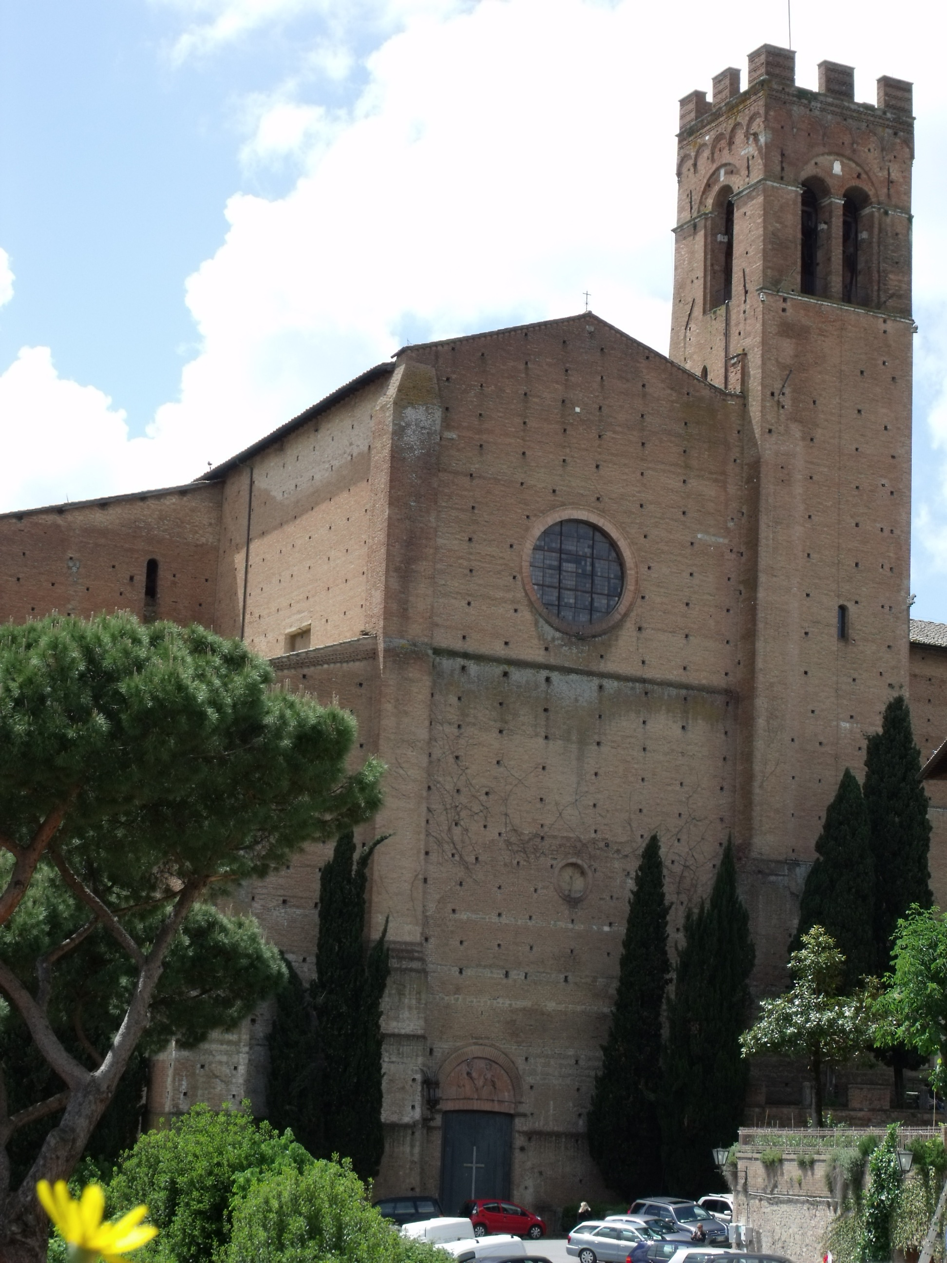 Basilica di San Domenico, Krypta, linkes Querschiff und Turm vom Palazzo Bastone del Pappagallo am Camporegio gesehen